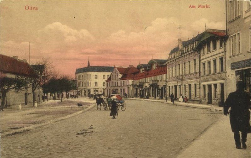 Oliva (Danzig) Am Markt.